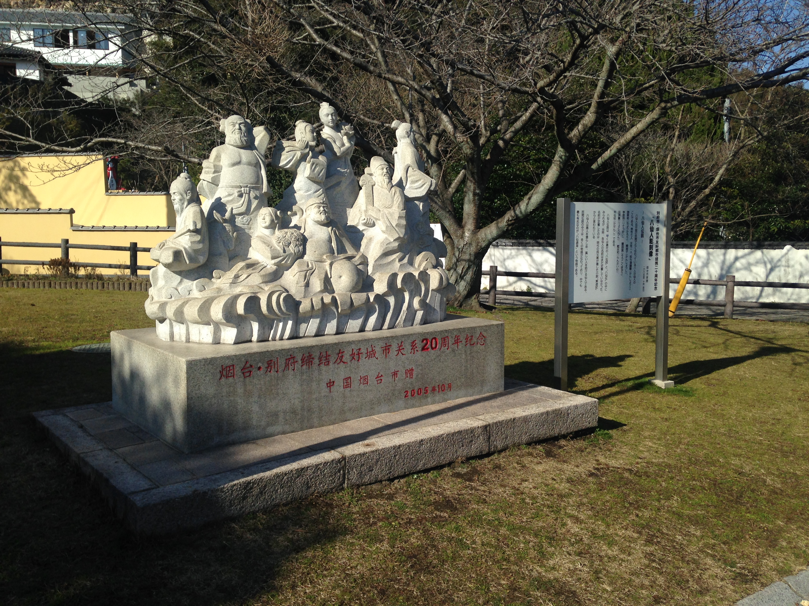 大分県別府市にある煙台・別府友好都市関係締結20周年記念像。テーマは「八仙」